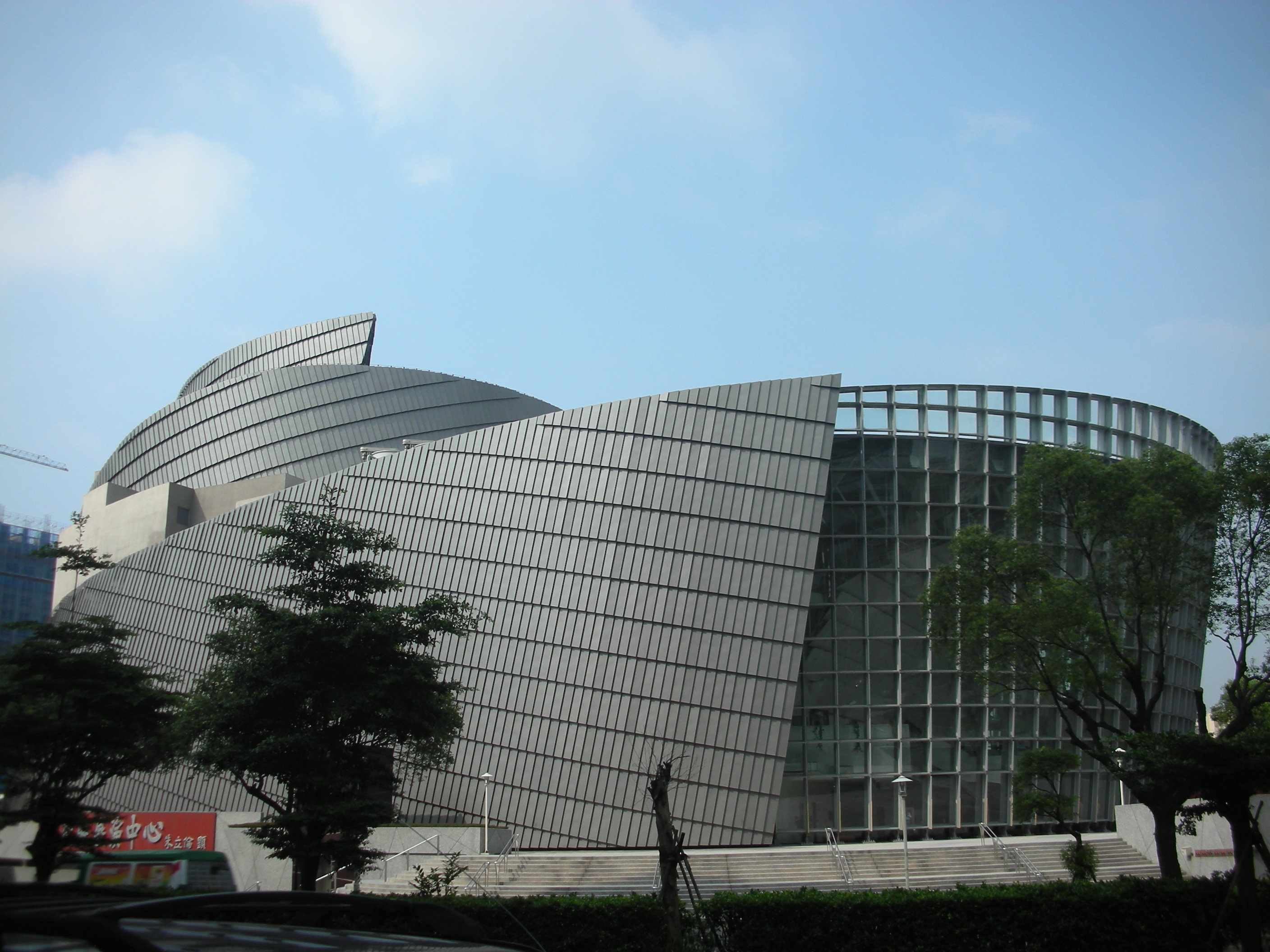 桃園多功能展演中心